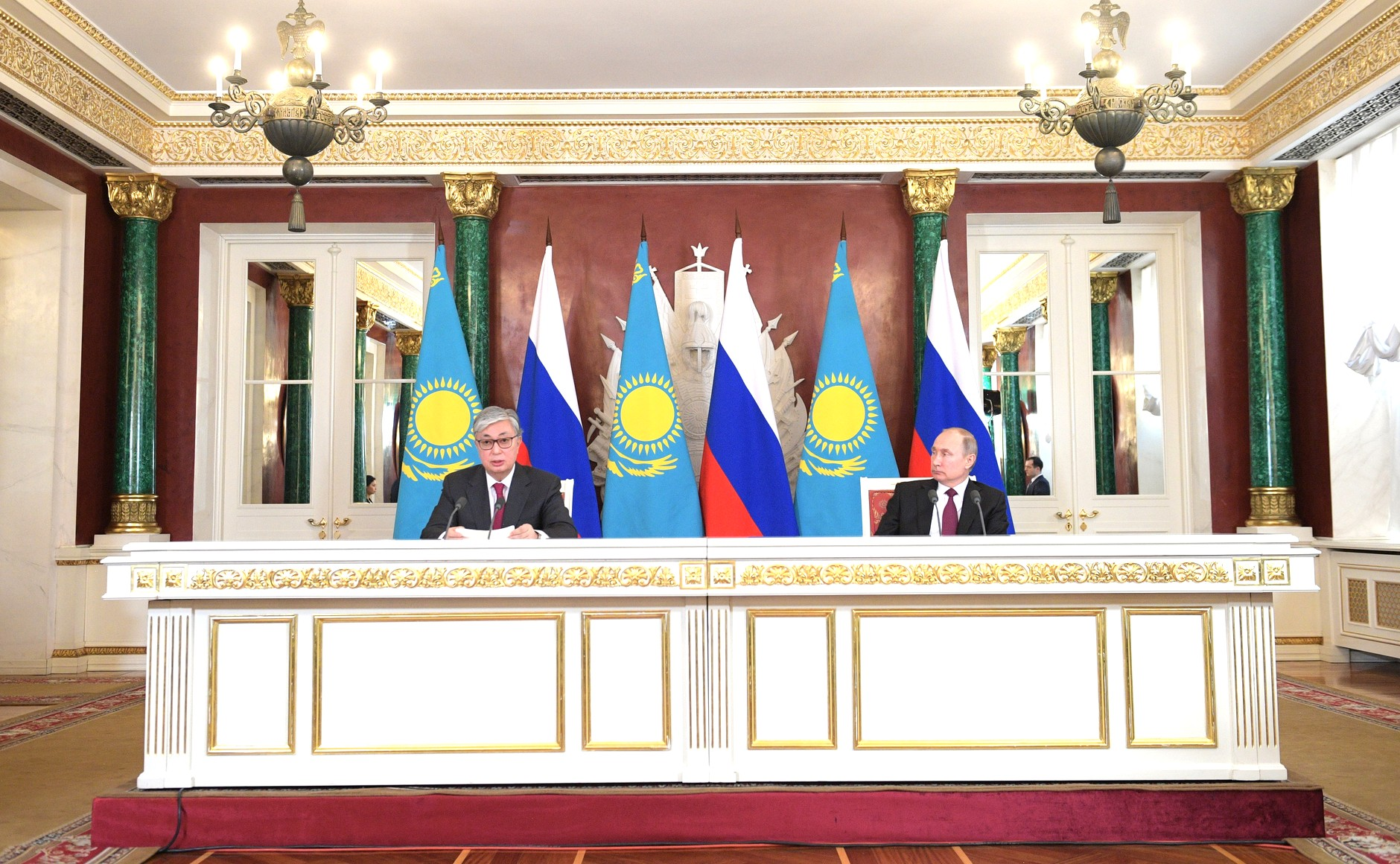 Президент Российской Федерации Владимир Путин с Президентом Республики Казахстан Касым-Жомартом Токаевым по окончании российско-казахстанских переговоров